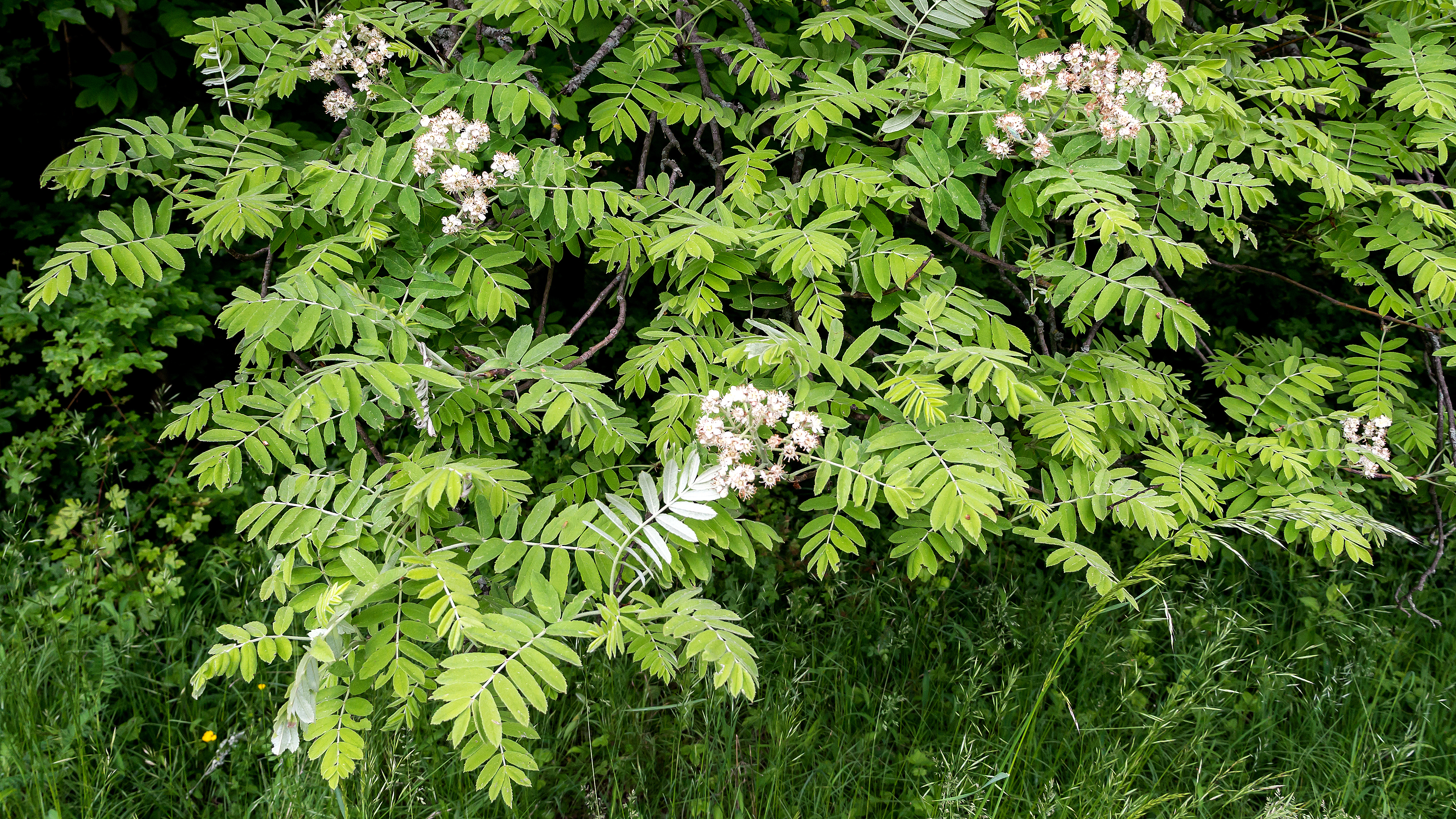 Speierlinge Doc.-Nr. 1996-15 Ziegenhain VII Naturdenkmal Jena